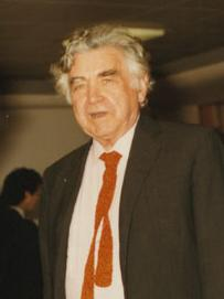 Rodrigo Moynihan